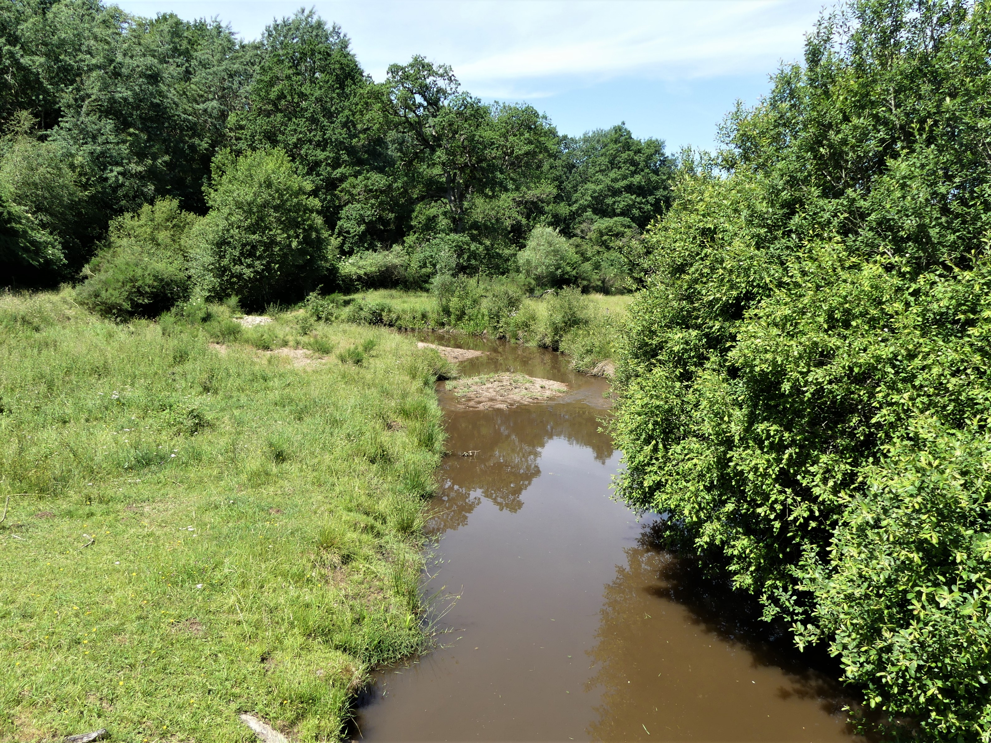 Le Vioulou au pont de la route reliant Faral à la Fabrègue, en limite des communes de Curan (à gauche) et Vézins-de-Lévézou (à droite), Aveyron, France. Vue prise en direction de l'aval.